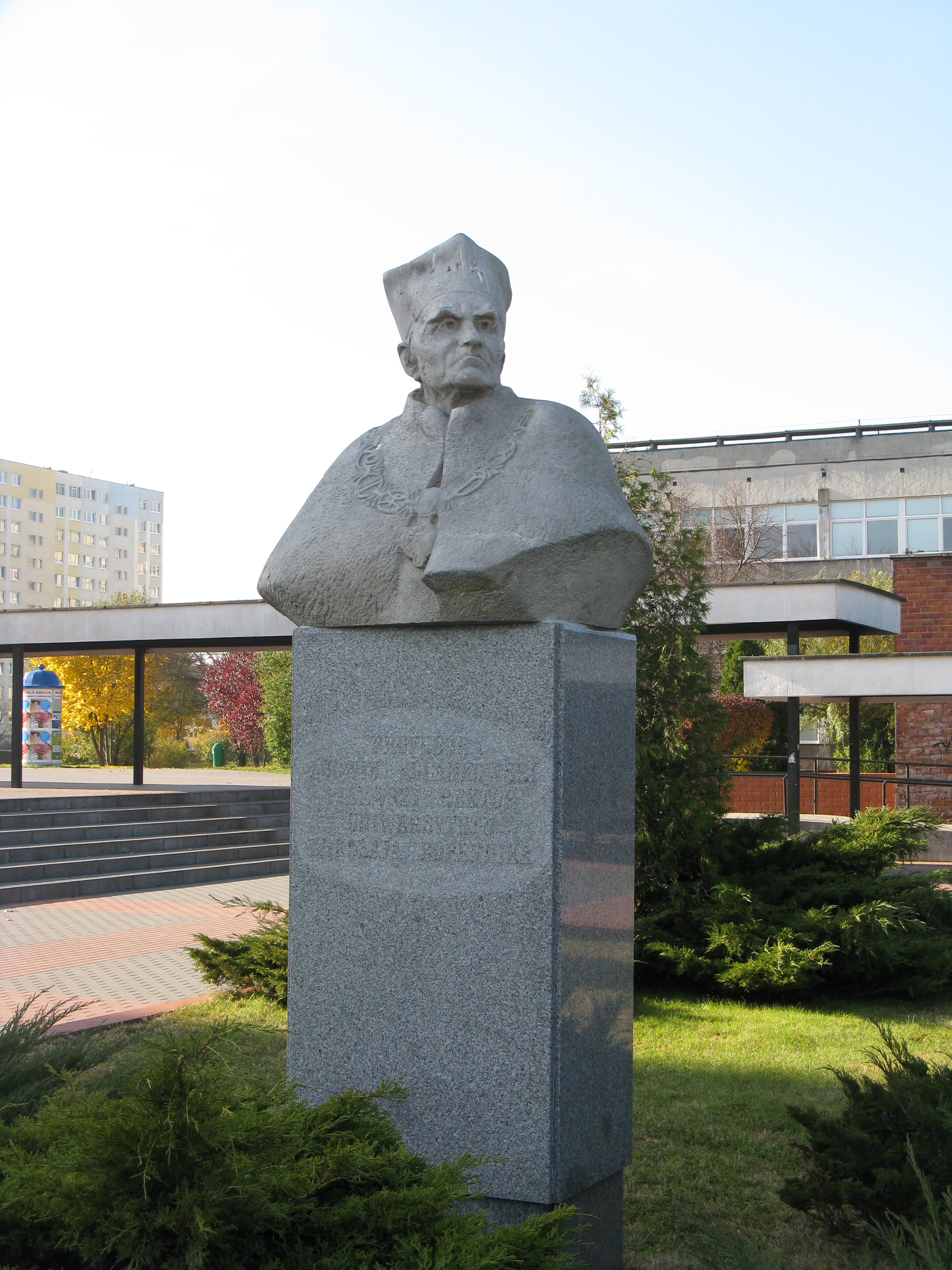 Pomnik Ludwika Kolankowskiego na UMK w Toruniu